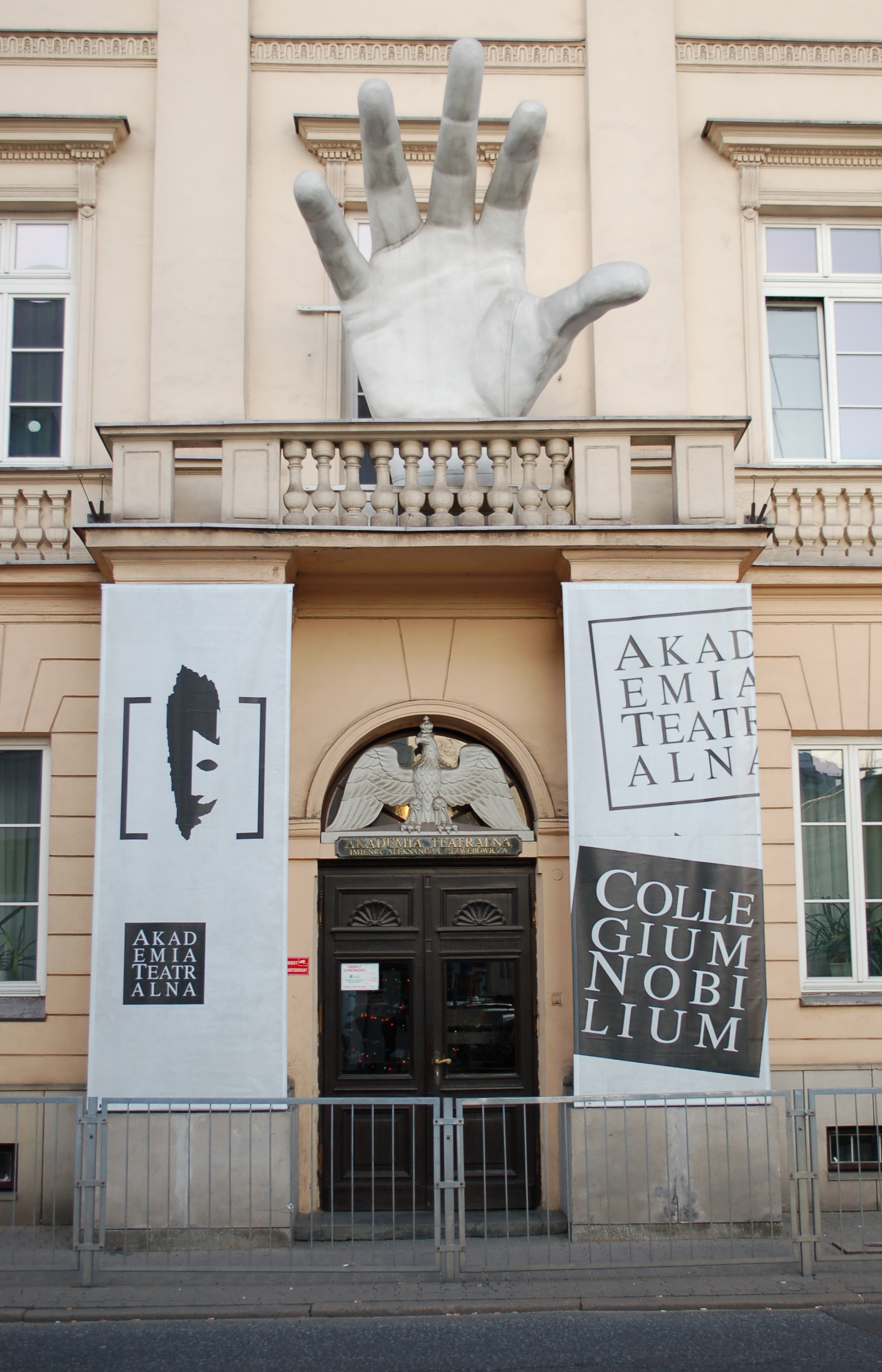 Collegium Nobilium Warsaw, Miodowa Street